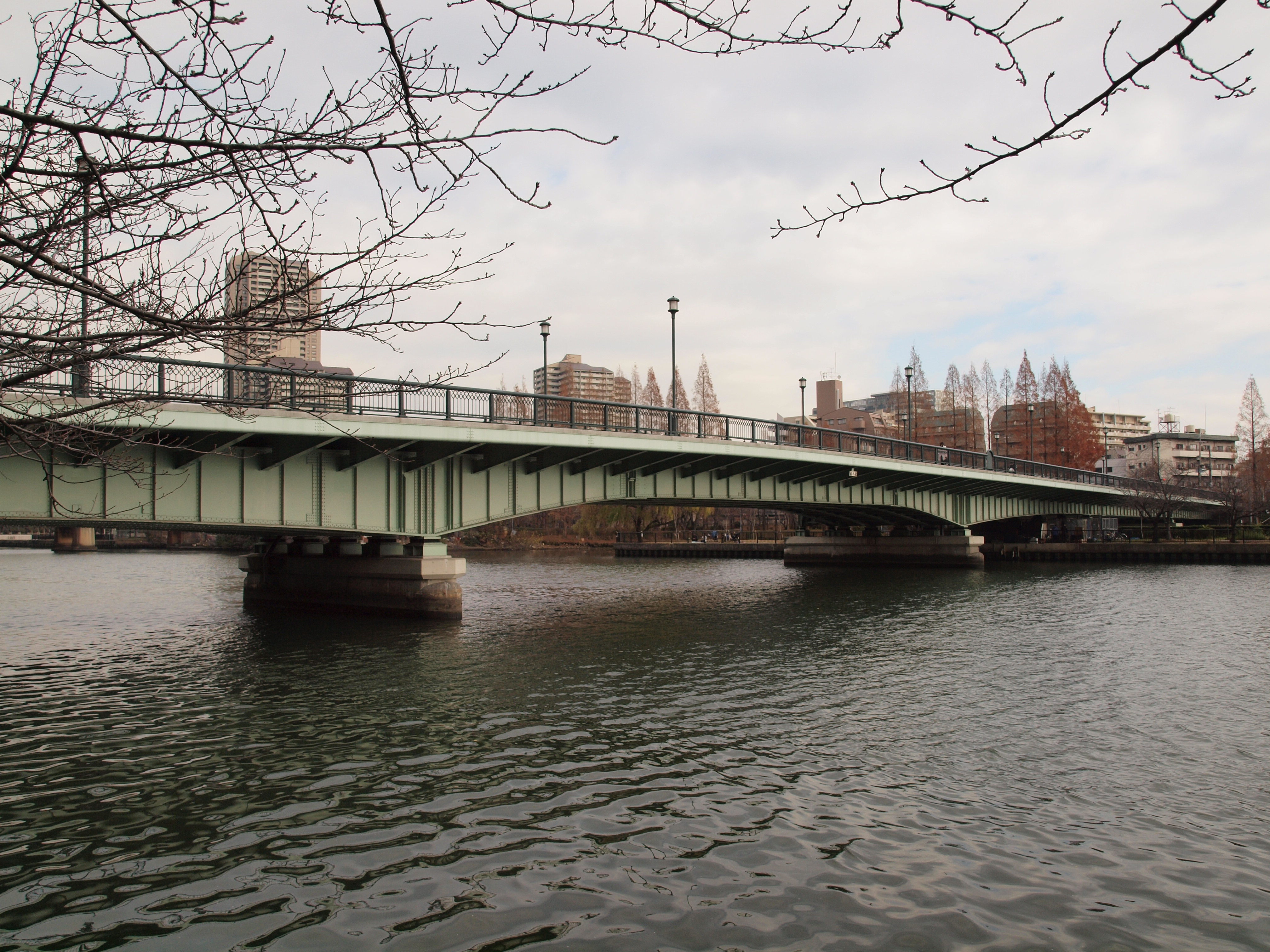 源八橋（大阪市北区-都島区） 2008年12月撮影。 機材：E-30 撮影者：Kansai explorer